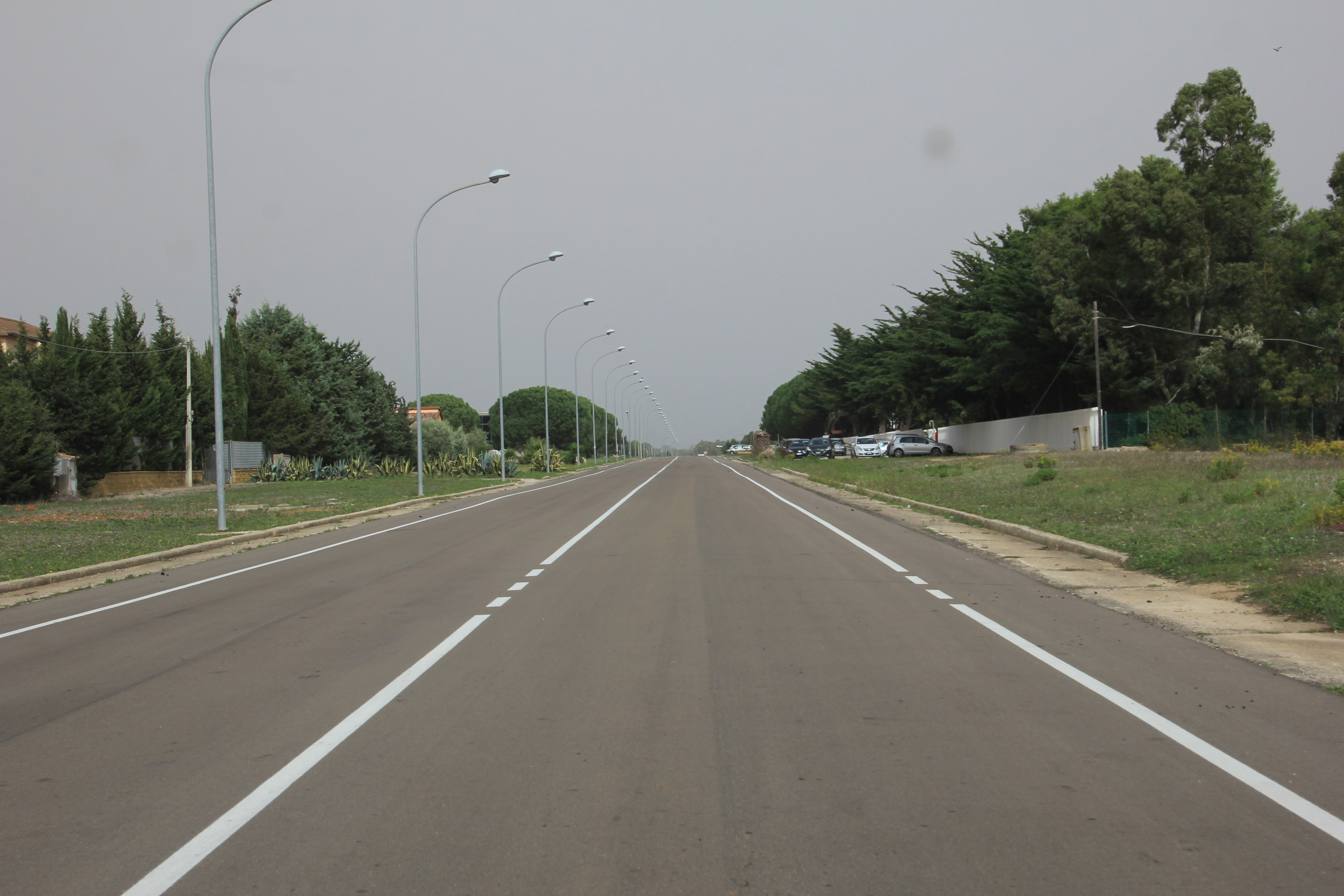 Alghero, zona industriale San Marco